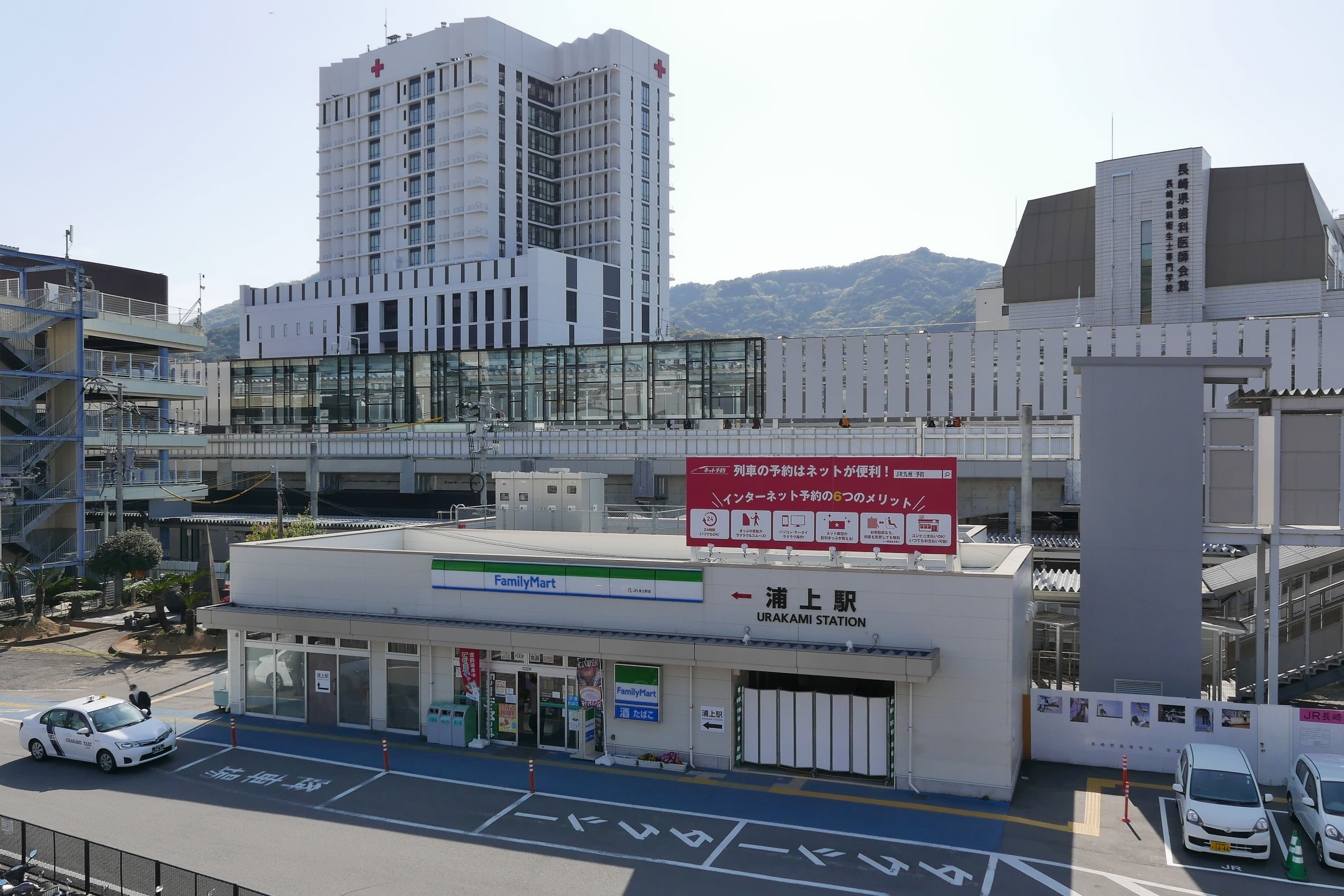 高架駅になった長崎本線の浦上駅舎（長崎県長崎市）。